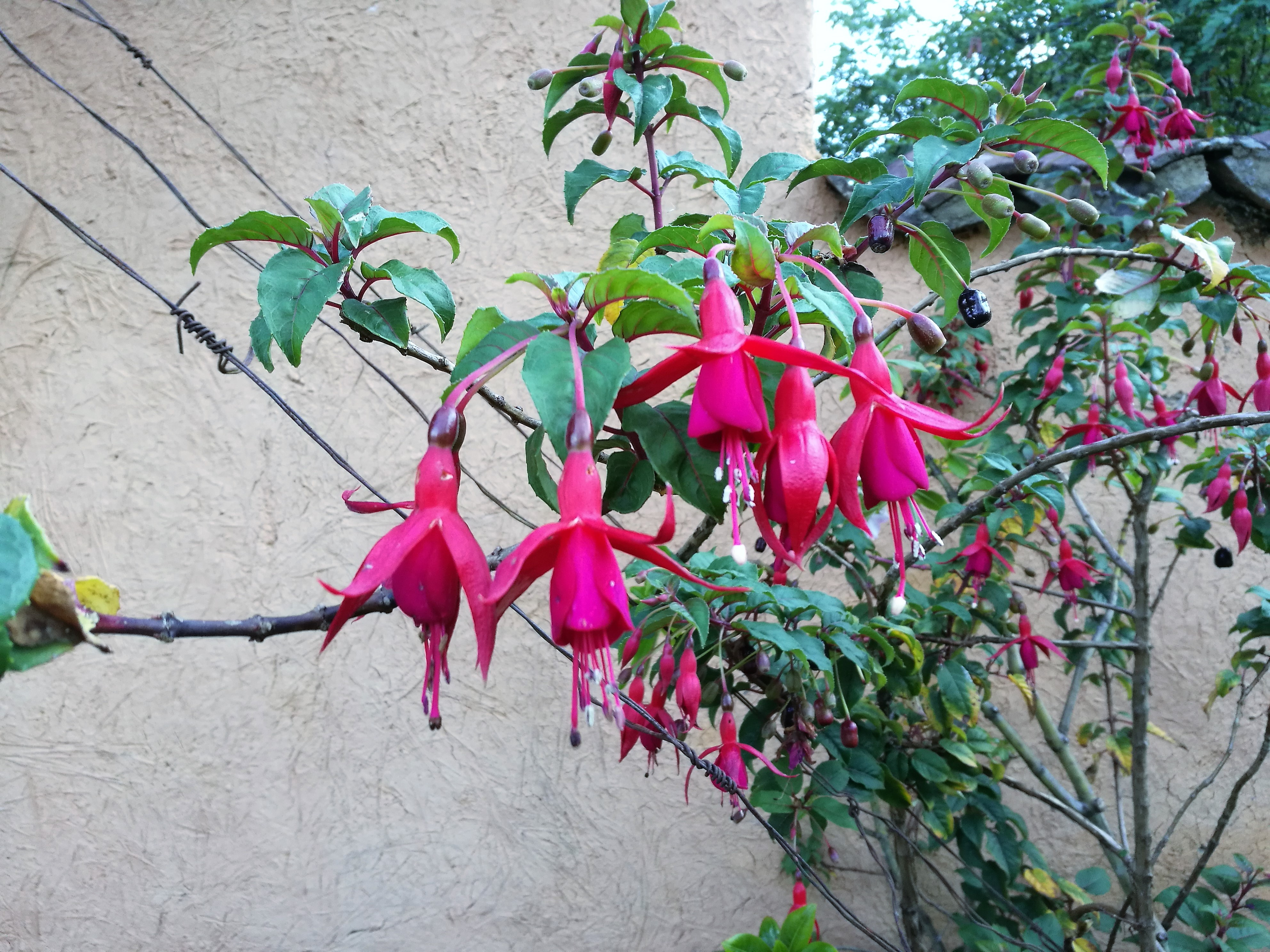 Flor del jardí del museu de Leimebamba